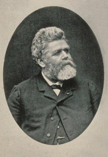 Théodore Deck, céramiste, né le 2 janvier 1823 à Guebwiller, décédé à Sèvres, le 15 mai 1891. Larger (phot.). 1891. Bibliothèque nationale et universitaire de Strasbourg